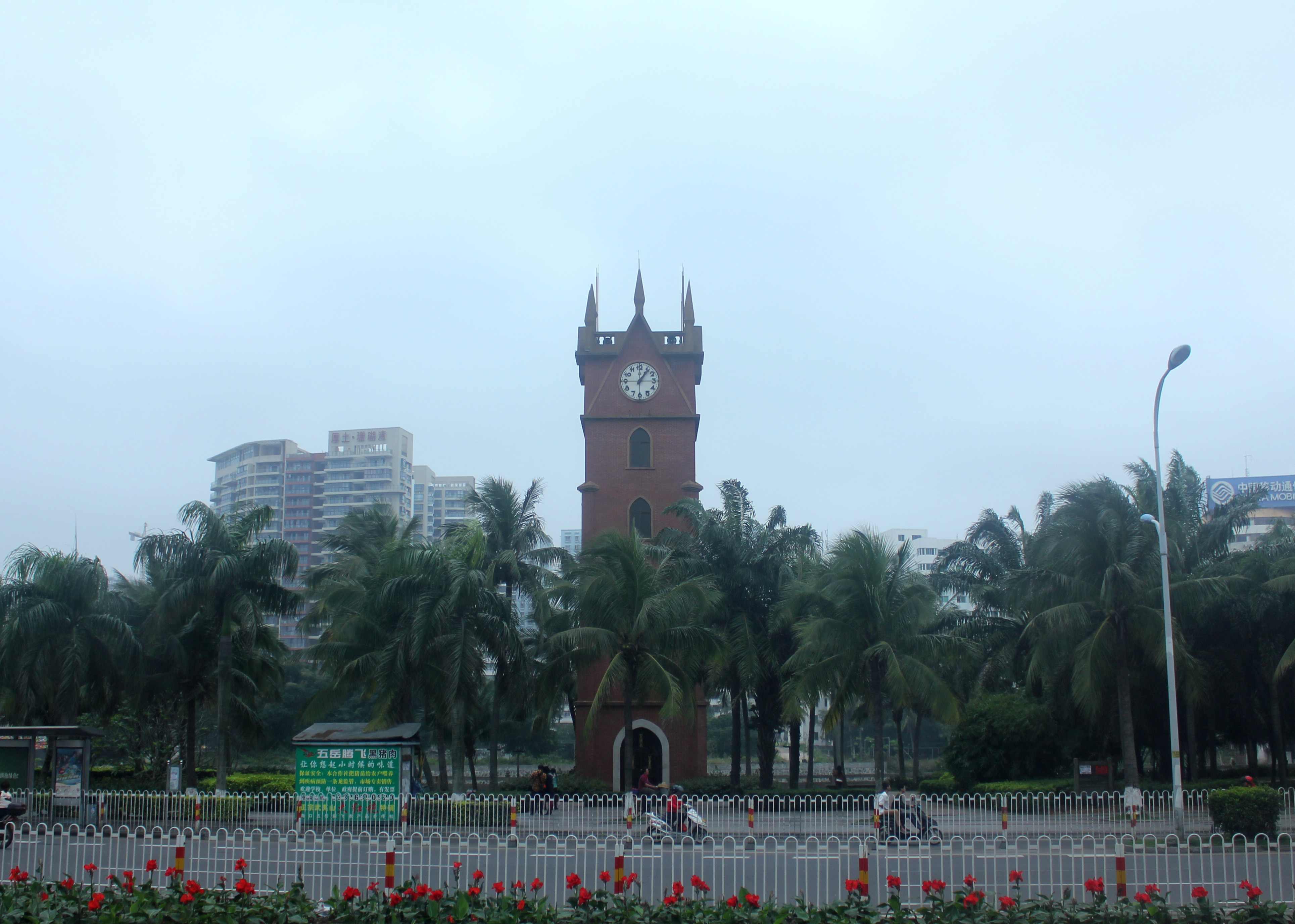 中国海南省海口市钟楼